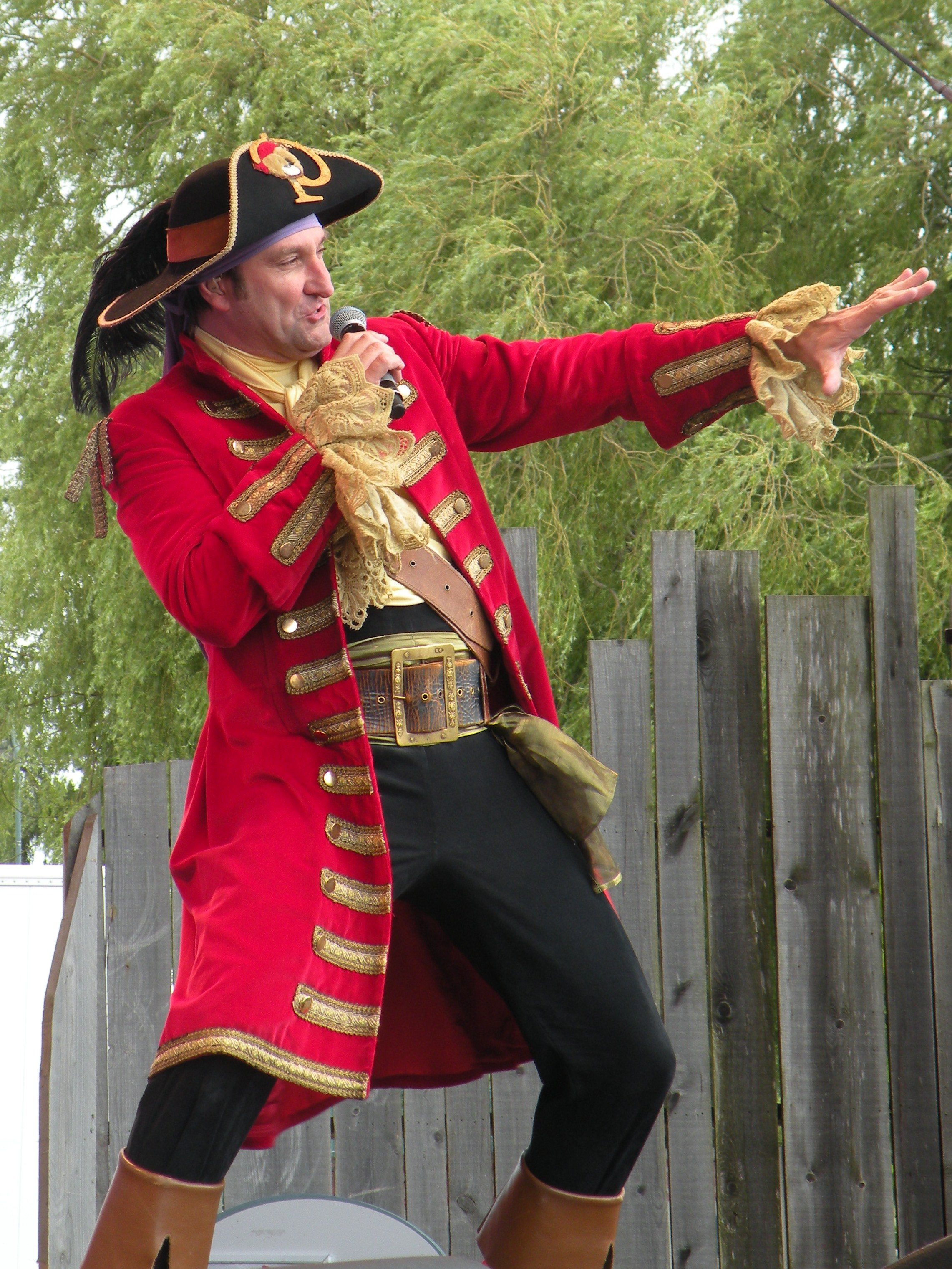 Peter Van De Velde als Piet Piraat tijdens een optreden op het dorpsplein van Plopsaland De Panne in België